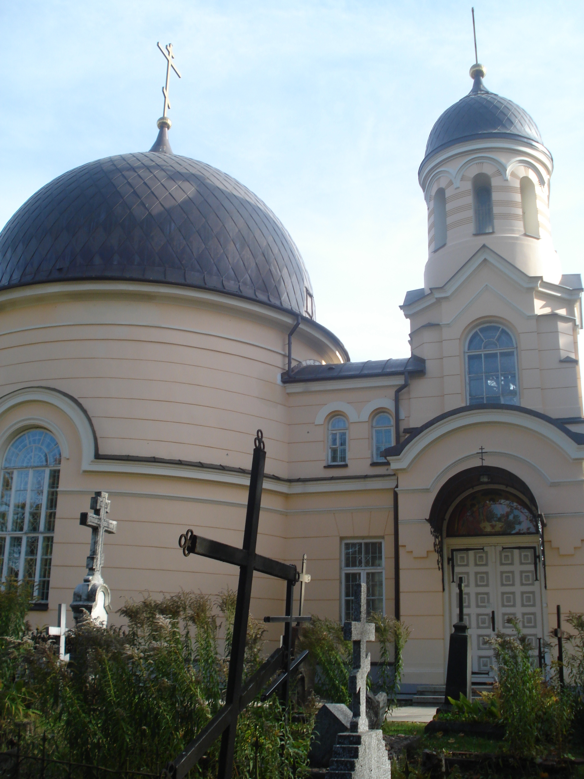 Orthodox Church of Saint Euphrosyne in Vilnius (Liepkalnių g.)